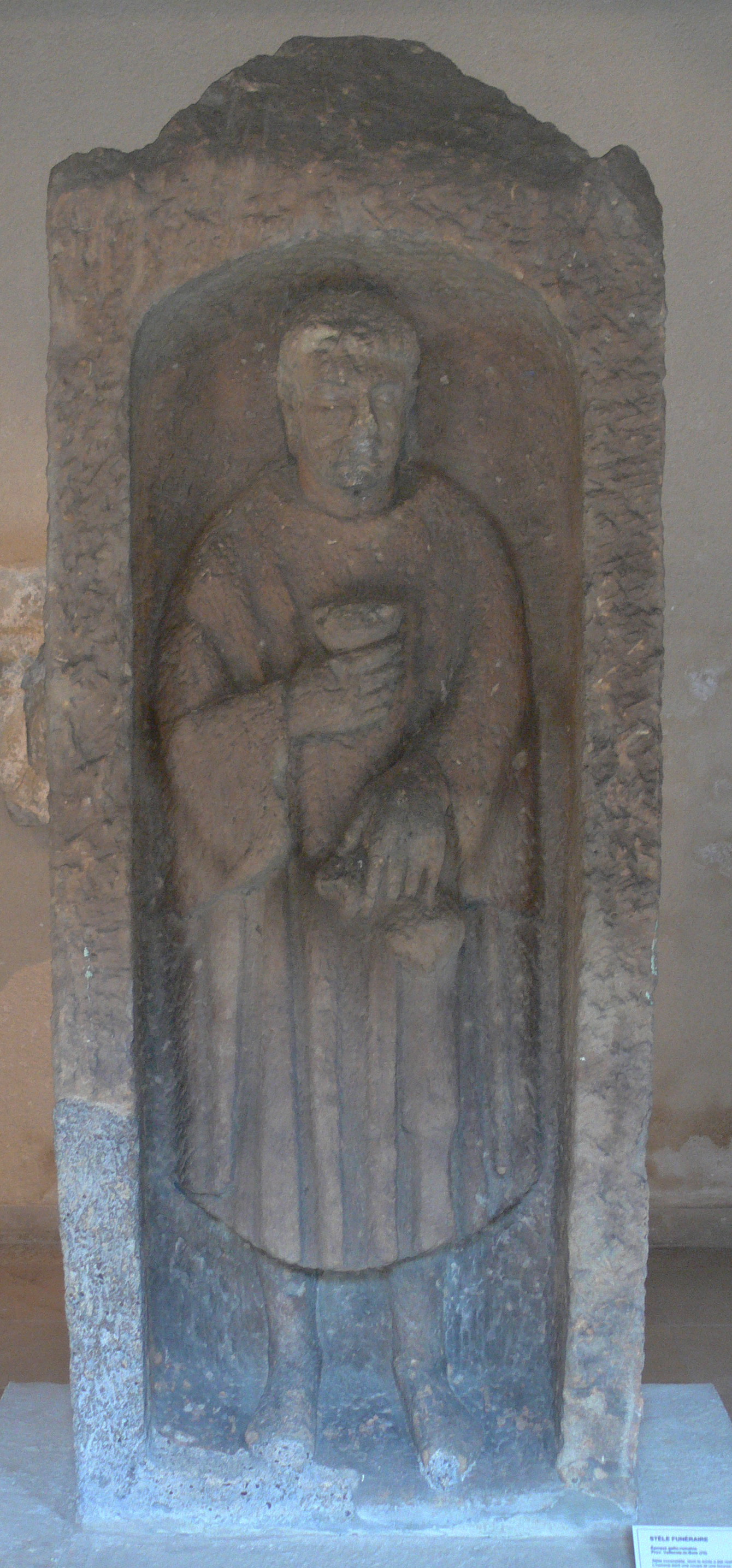 Stèle funéraire d'époque gallo-romaine, découverte à Vallerois-le-Bois (Haute-Saône, France). Grès. Vesoul, musée Georges-Garret, inv. 900.1.7, don de la Salsa